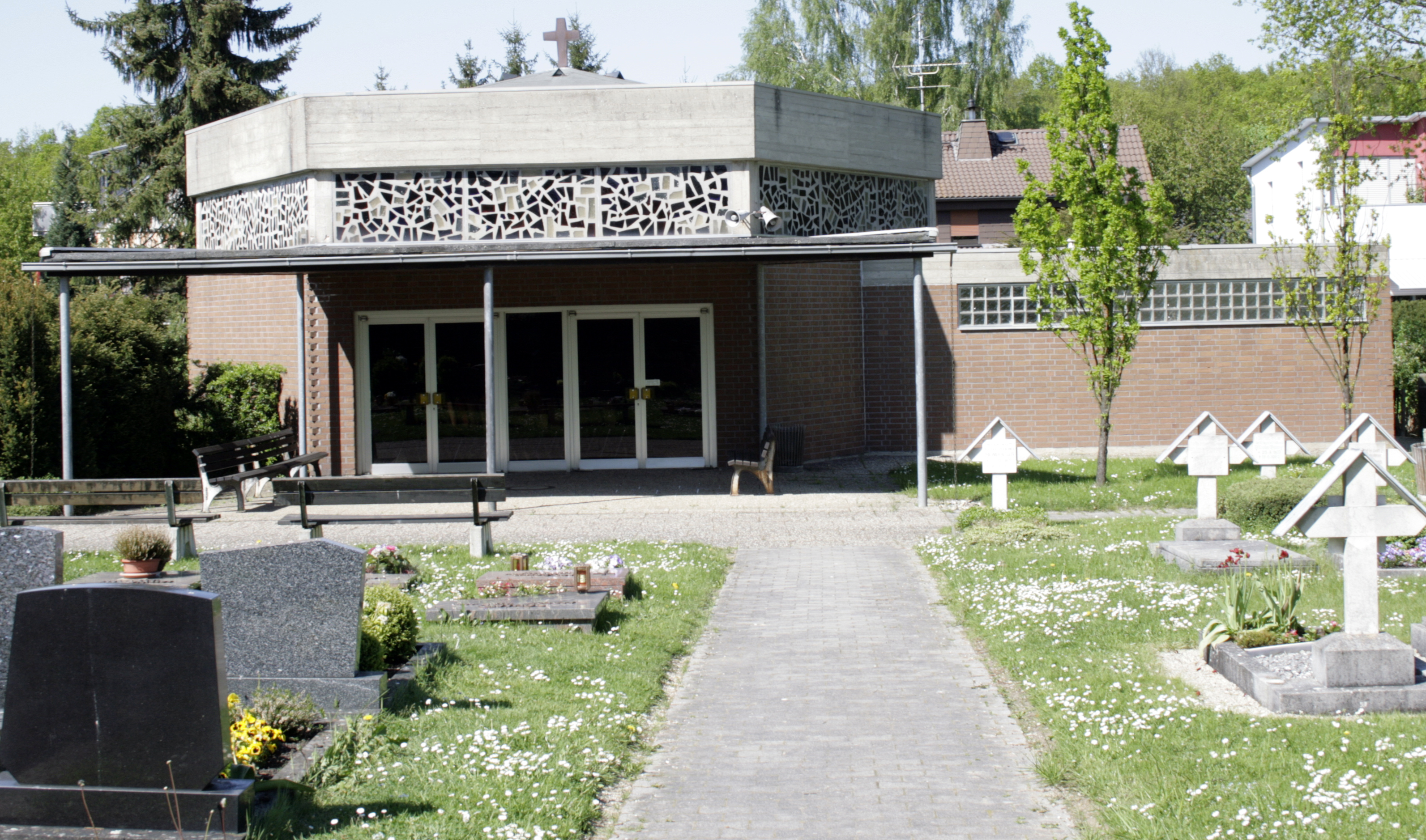 Friedhofskapelle in Linter, Deutschland